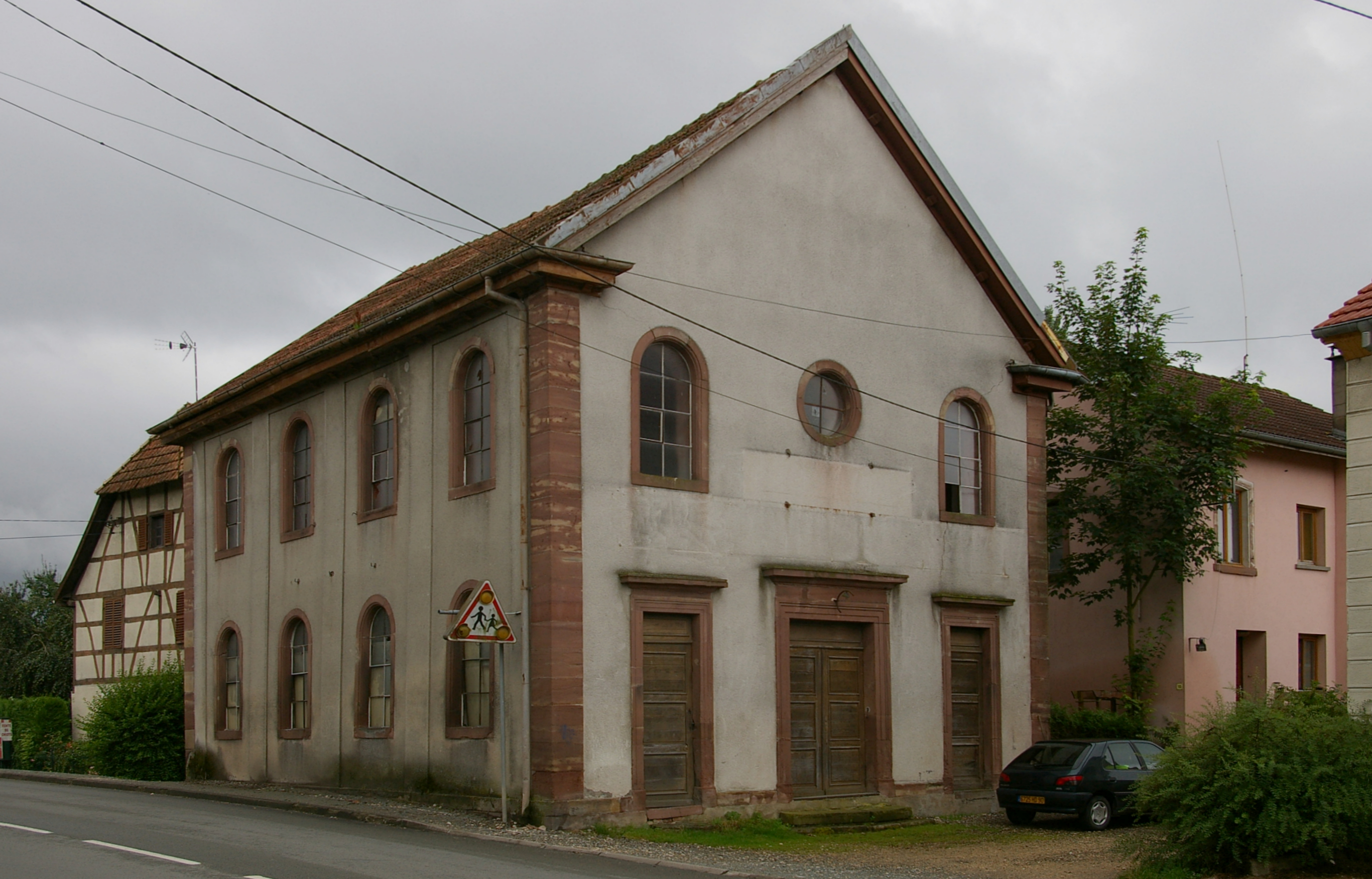 Synagogue de Foussemagne (Territoire de Belfort), abandonnée depuis 1945